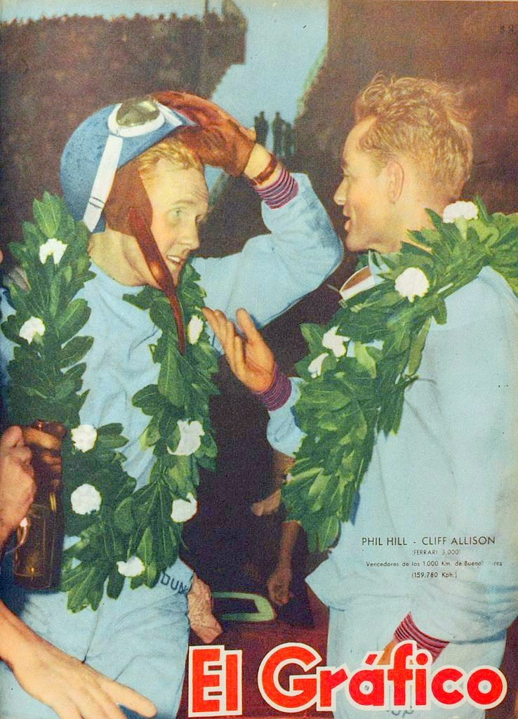 El Grafico del 10 de Febrero de 1960. Edicion 2107